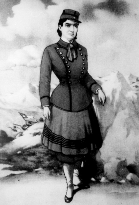 Candelaria Pérez (* Santiago de Chile, 1810 - † 28 de marzo de 1870), también conocida como Sargento Candelaria, fue una militar chilena que participó en la Guerra contra la Confederación Perú-Boliviana.